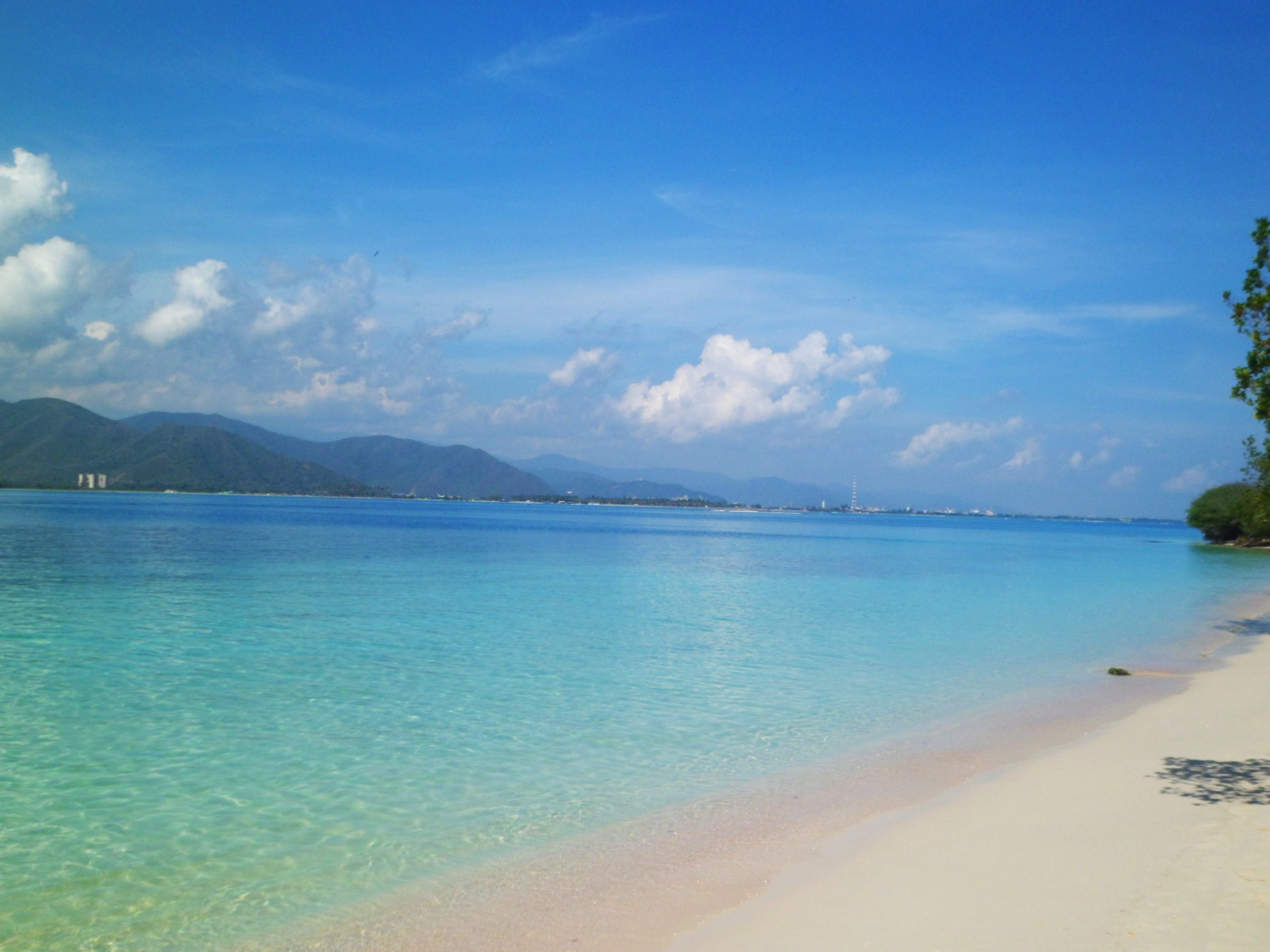 Isla larga, estado Carabobo.